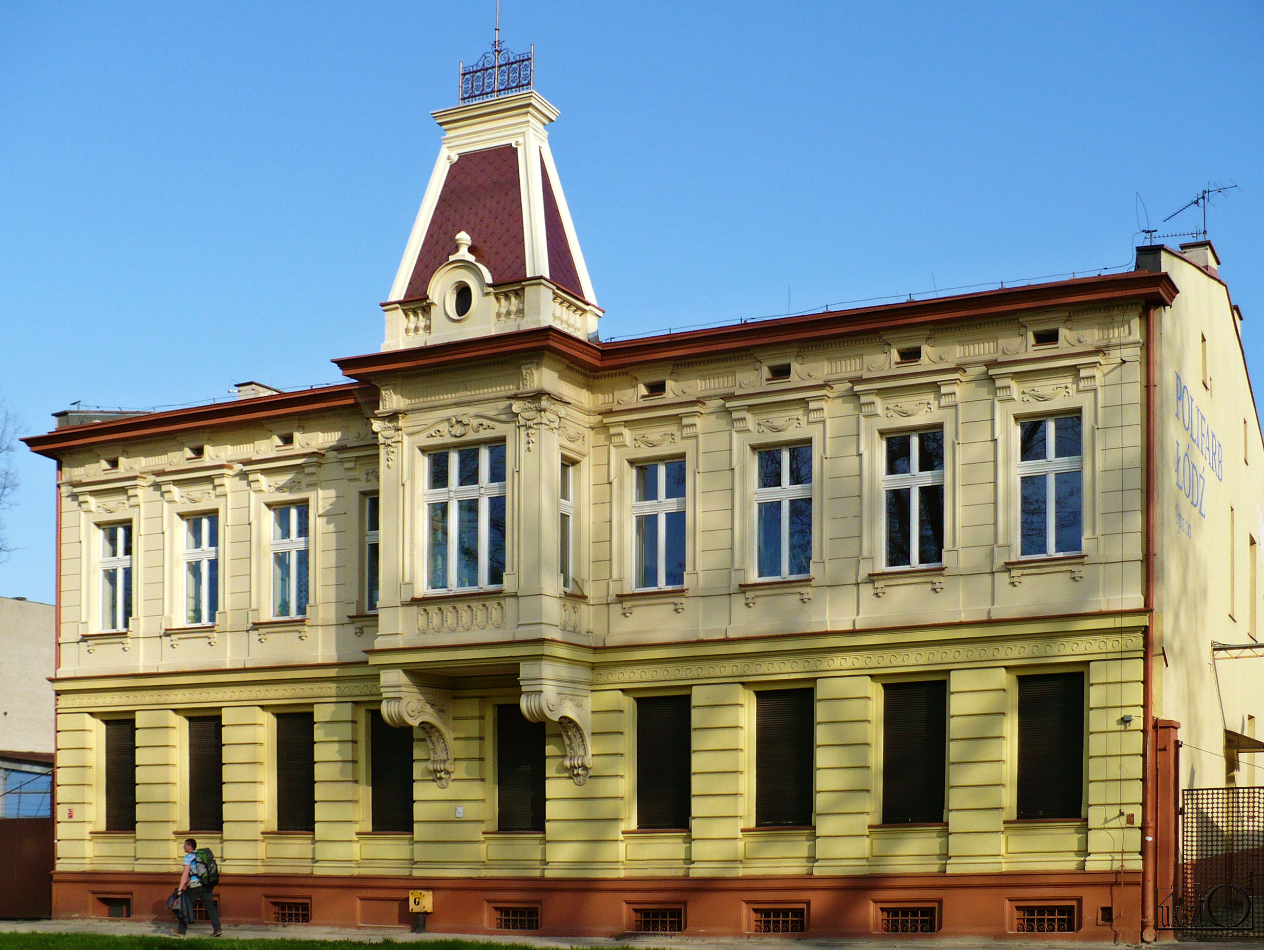 Łódż, ul. 6 Sierpnia